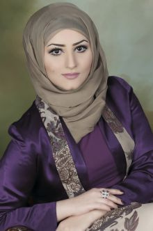 الكاتبة الكويتية سارة الدريس